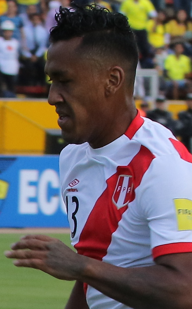 Quito 5 Sep (Andes).- Encuentro por eliminatorias Rusia 2018 entre Ecuador y Perú. Fotografías: Carlos Rodríguez/Andes.